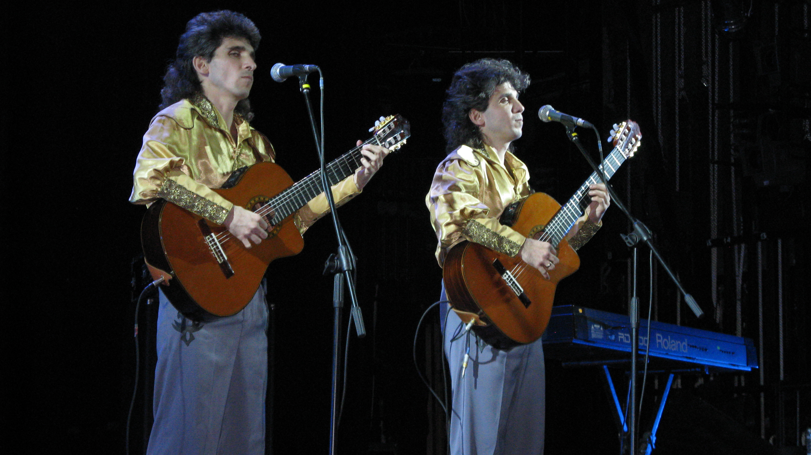 Братья Золотухины на фестивале "Червона рута", Киев, 2008 год